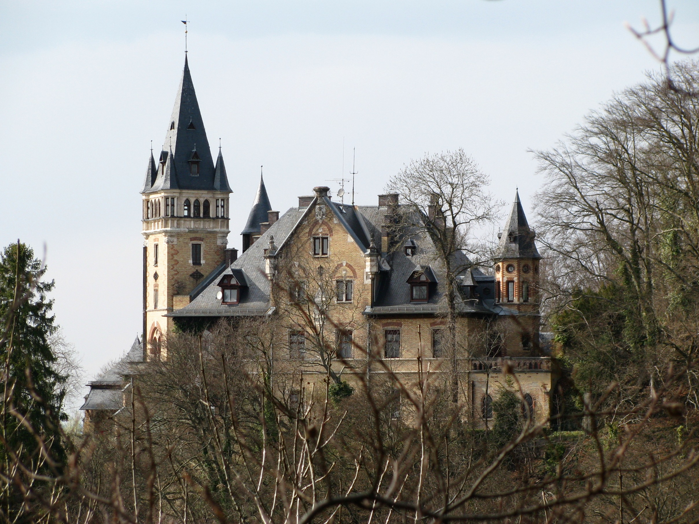 Hochschloss Pähl von gegenüber der Pähler Schlucht